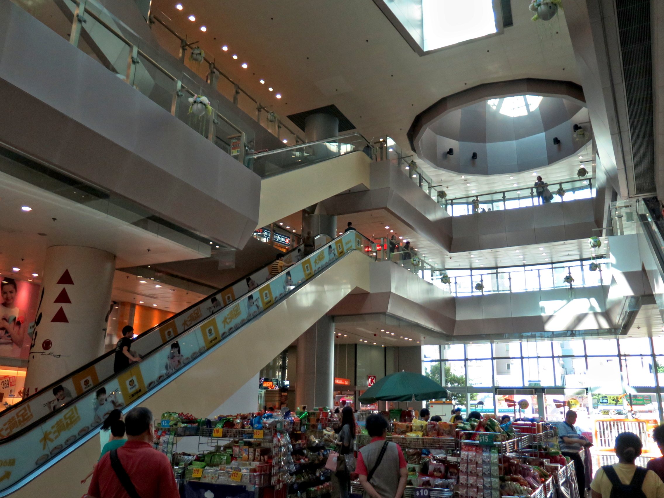 Oi Tung Estate Shopping Arcade Void